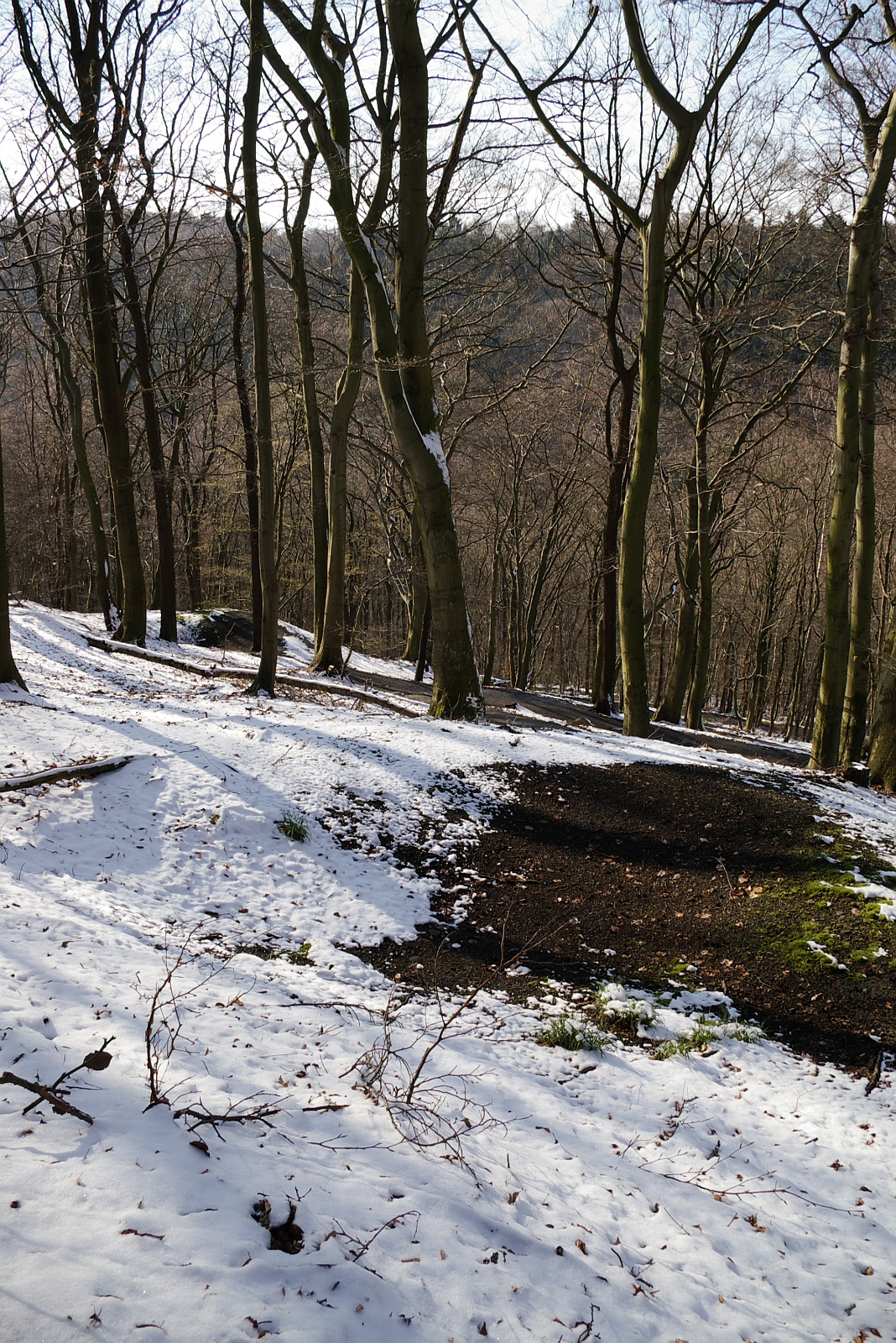 Syburger Bergbauweg, zwei Pingen unterhalb Stollen 2, schwach erkennbar an den schneefreien Vertiefungen